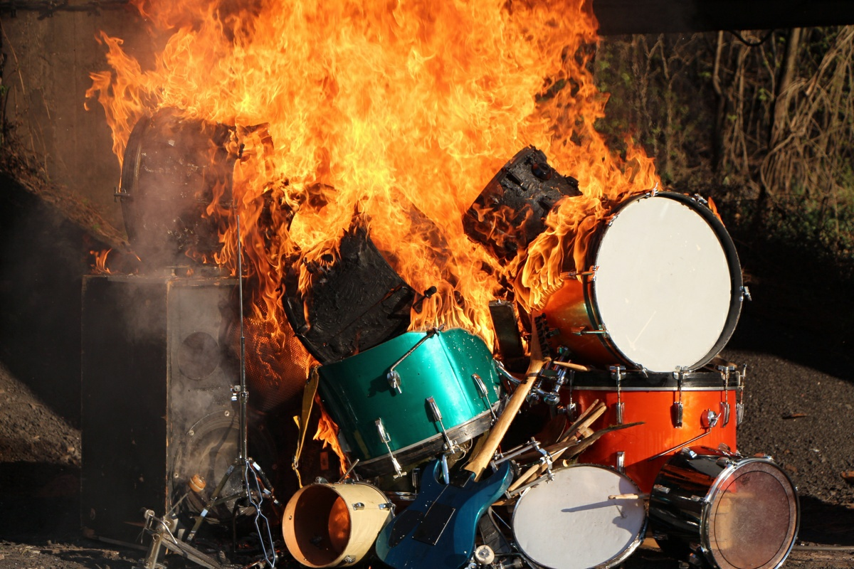 Digital photography by Groupe Guma Guar from 2015.